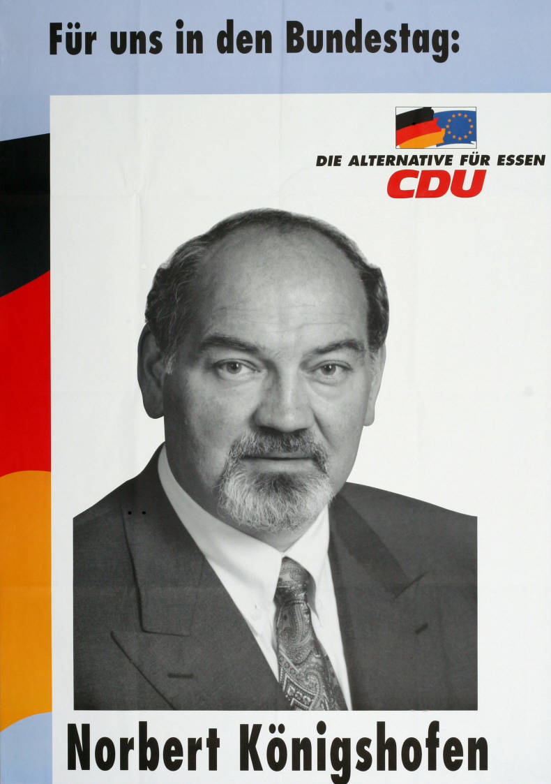 Für uns in den Bundestag: Die Alternative für Essen CDU Norbert KönigshofenAbbildung:Porträtfoto - NationalfarbenPlakatart:Kandidaten-/Personenplakat mit PorträtObjekt-Signatur:10-001: 4048Bestand:Plakate zu Bundestagswahlen (10-001)GliederungBestand10-18:Plakate zu Bundestagswahlen (10-001) » Die 13. Bundestagswahl am 16. Oktober 1994 » CDU » Mit PorträtfotoLizenz:KAS/ACDP 10-001: 4048 CC-BY-SA 3.0 DE